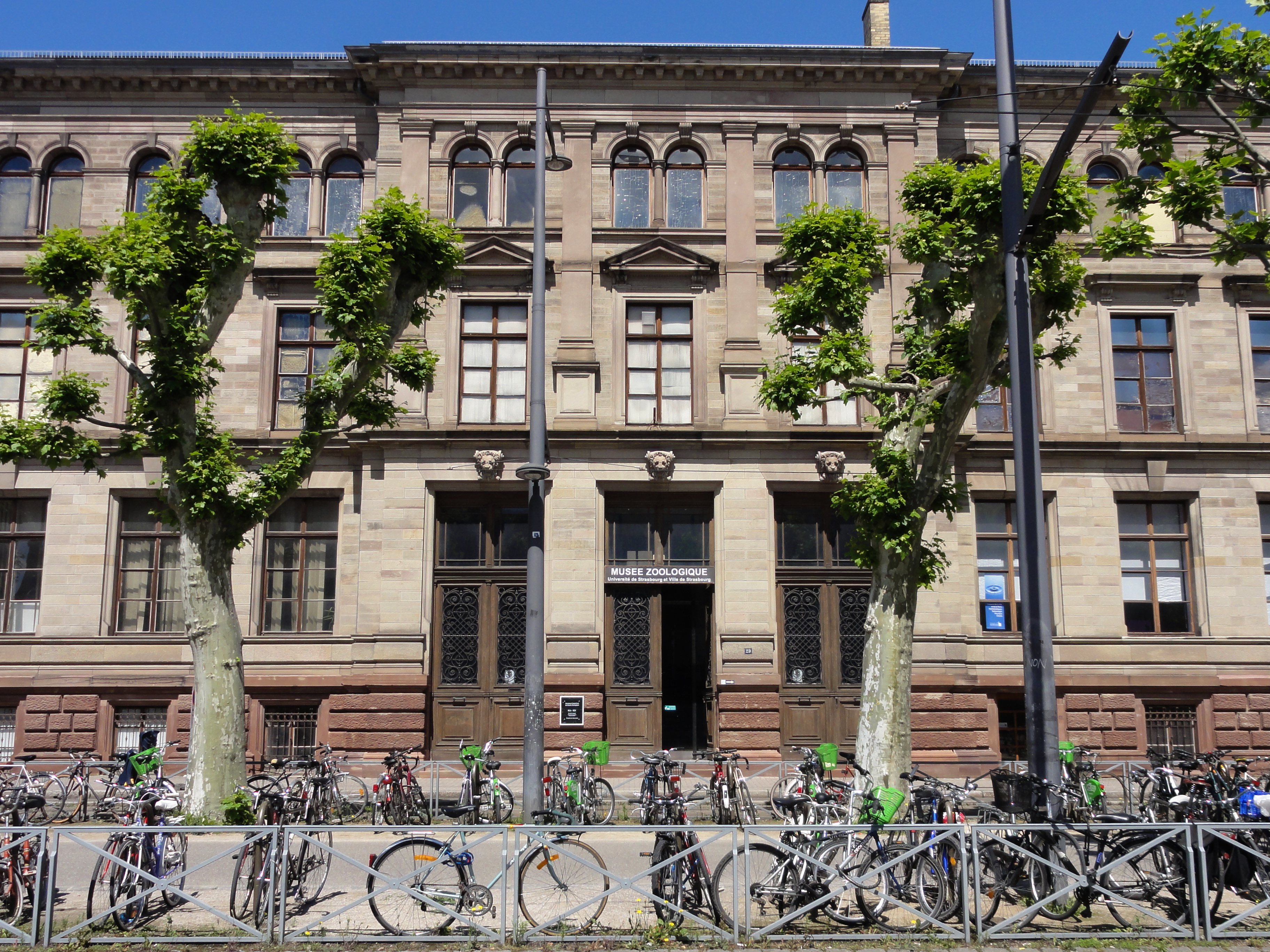 Alsace, Bas-Rhin, Strasbourg, Musée zoologique (1893), 29 boulevard de la Victoire.